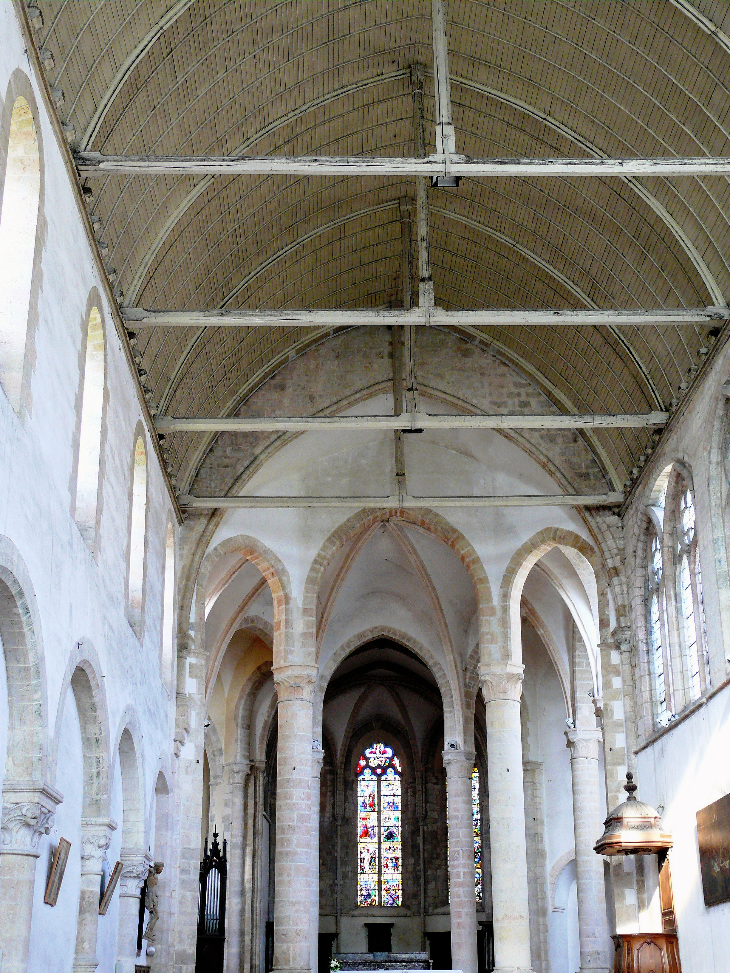 Ferrières - Abbatiale - Nef